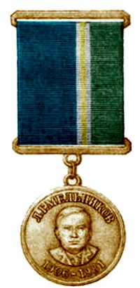 Медаль имени Л.Мельникова - ведомственная награда Ростехнадзора